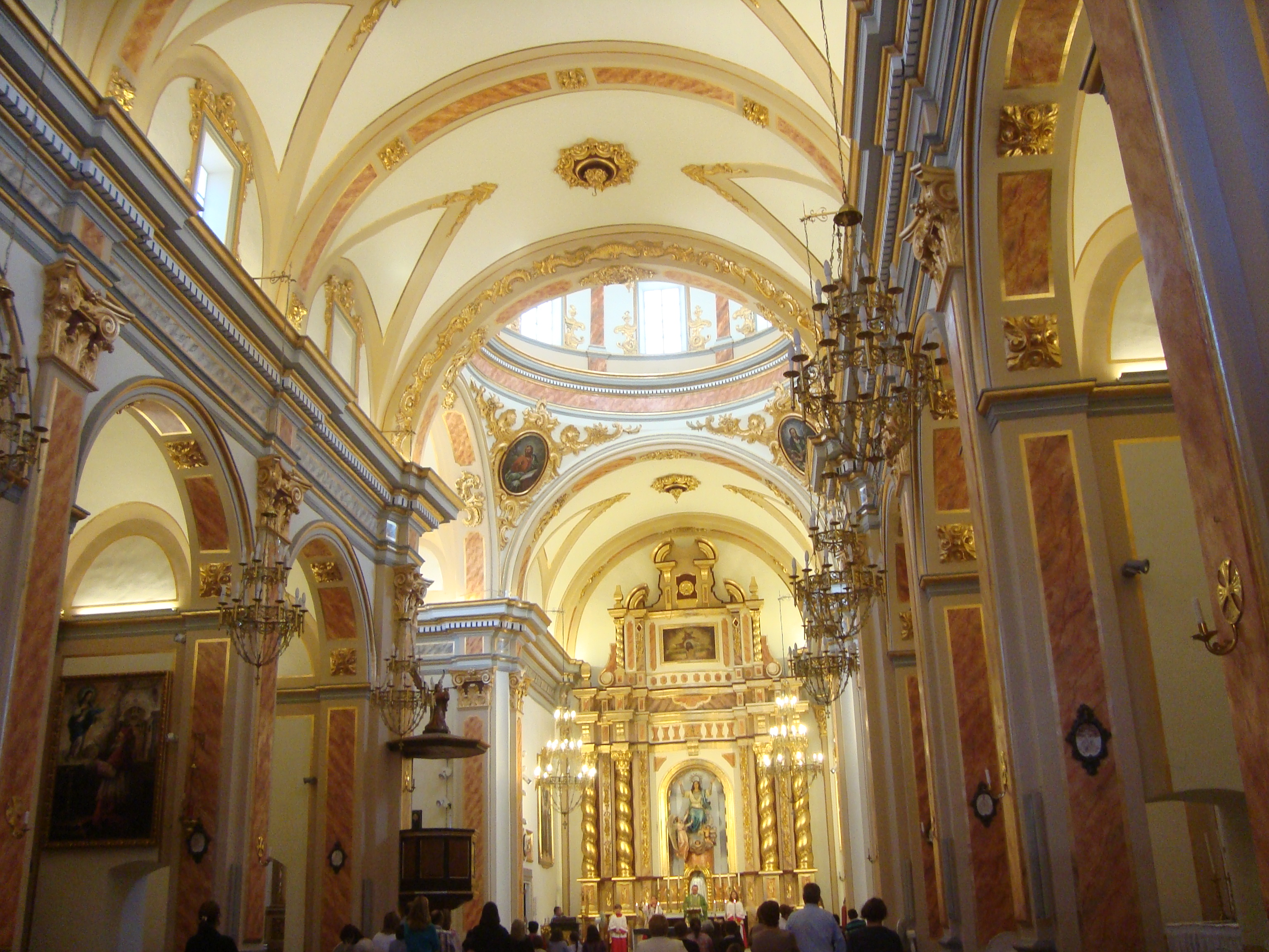 Església de l'Assumpció (Xilxes) 06.053-001.